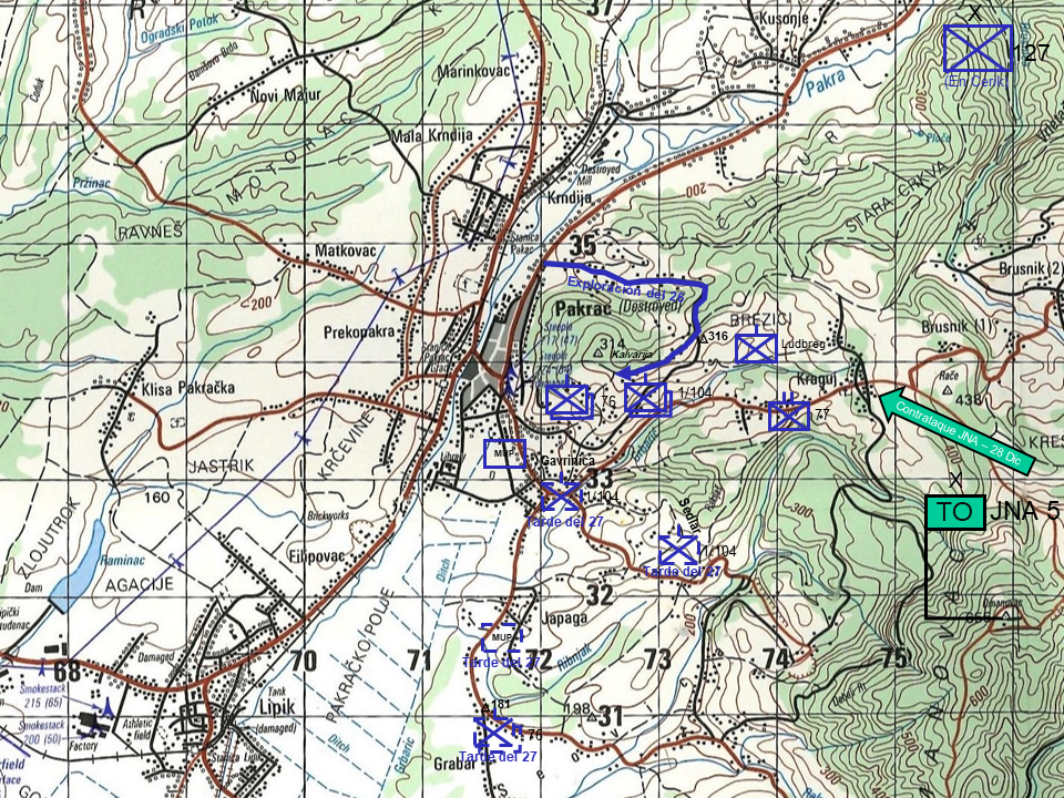 Realizado sobre la base de: - Martinić Jerčić, Natko (2014). «Operación de liberación de las fuerzas croatas en Eslavonia Occidental en otoño e invierno de 1991/1992». Centre for Croatian studies (Zagreb). - Ivančić, Ivan Zvonimir (2018-12-28). Luchas feroces y muchas víctimas: La Acción Alfa se lanzó el 24 de diciembre y se prolongó hasta el 29 de diciembre de 1991; El objetivo era liberar las posiciones enemigas alrededor de Pakrac. Braniteljski portal (en croata). Consultado el 2019-05-26.